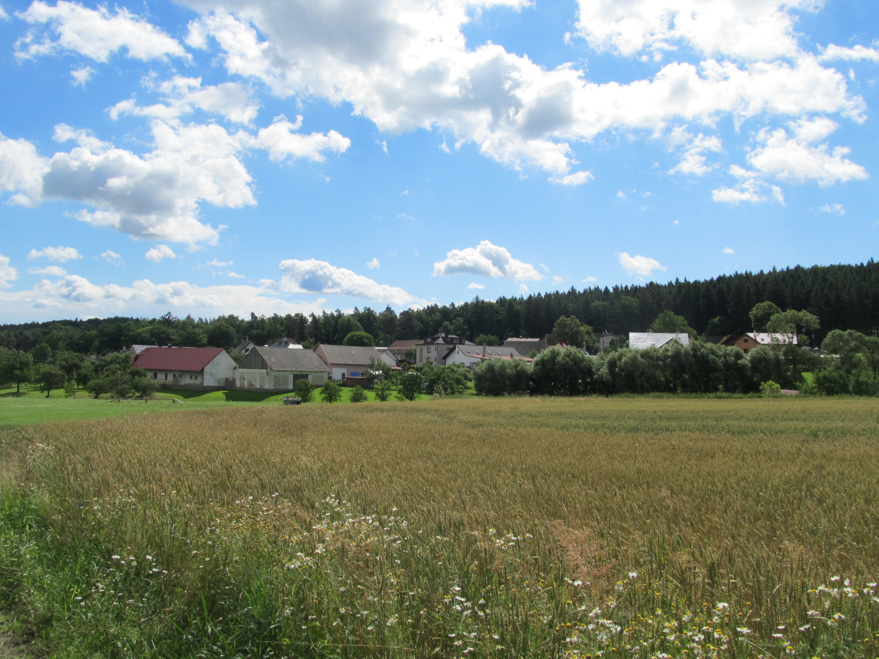 Tupadly